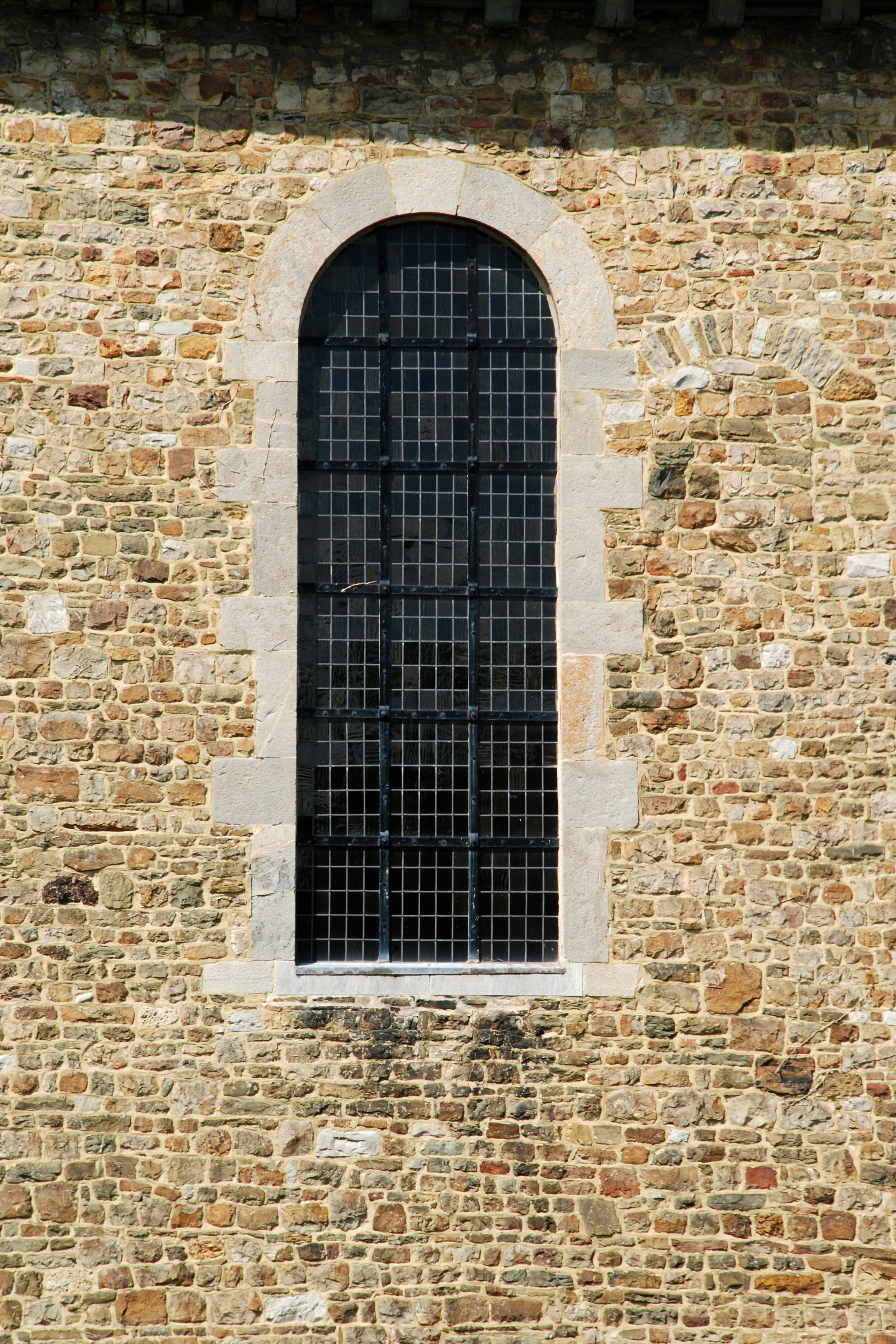 Belgique - Wallonie - Église Saints-Hermès-et-Alexandre de Theux